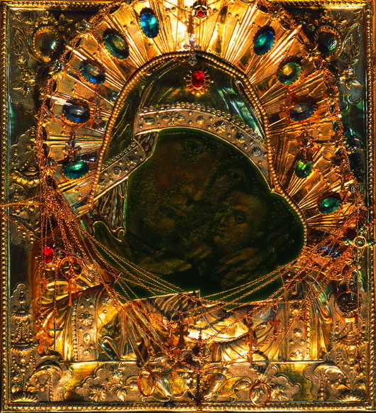 Чудотворная русская Корсунская Шпилёвская икона Пресвятой Богородицы. Тип Корсунская (т.е. Херсонесская). Явлена в селе Шпилёвке под Сумами. Писана на листе белого железа. Находилась в Преображенском кафедральном соборе Сум. Похищена из него в 2009 году. На конец 2013 не найдена.